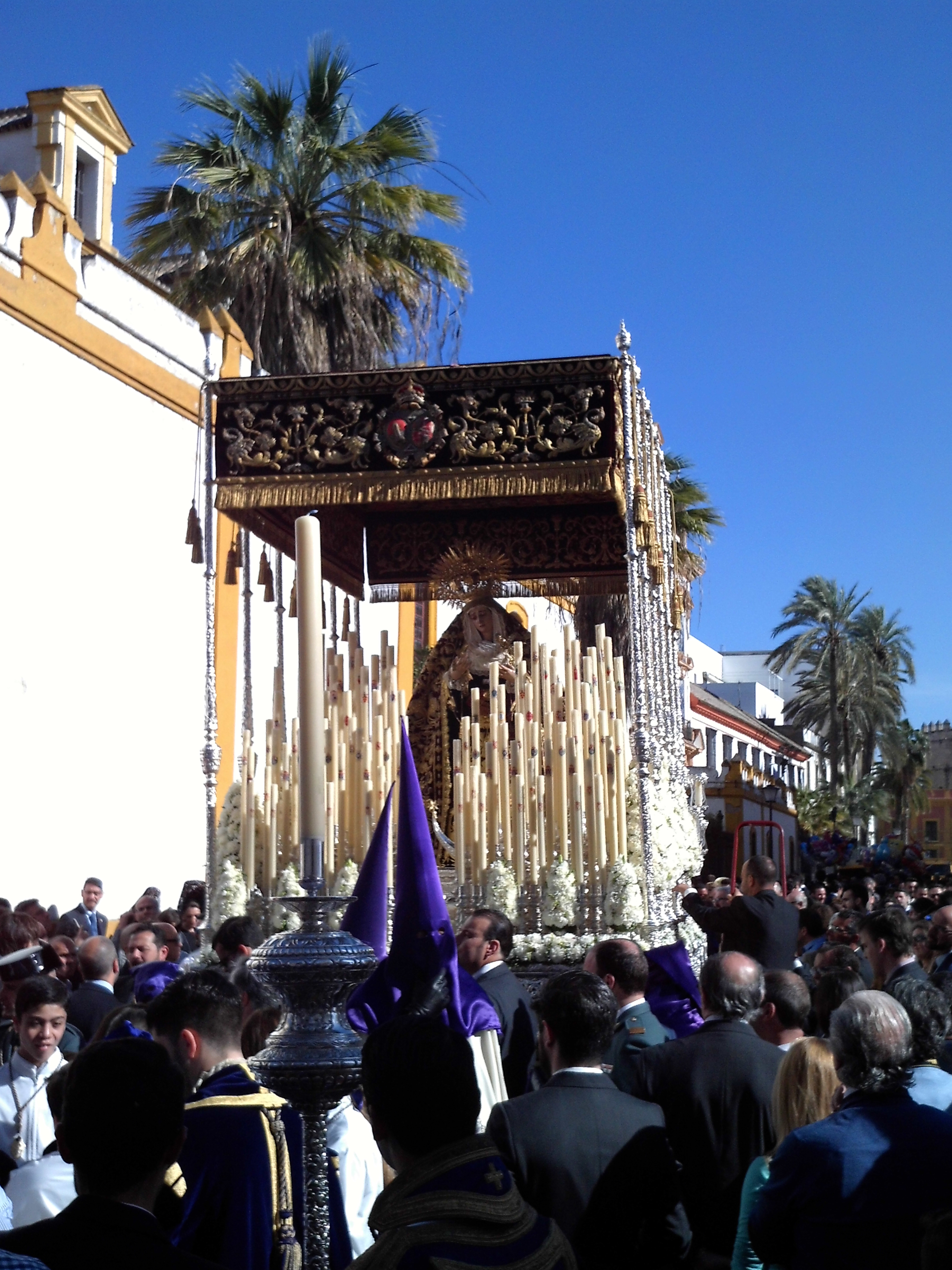 Virgen de la Victoria. Hermandad de las Cigarreras. Sevilla, Andalucía, España.